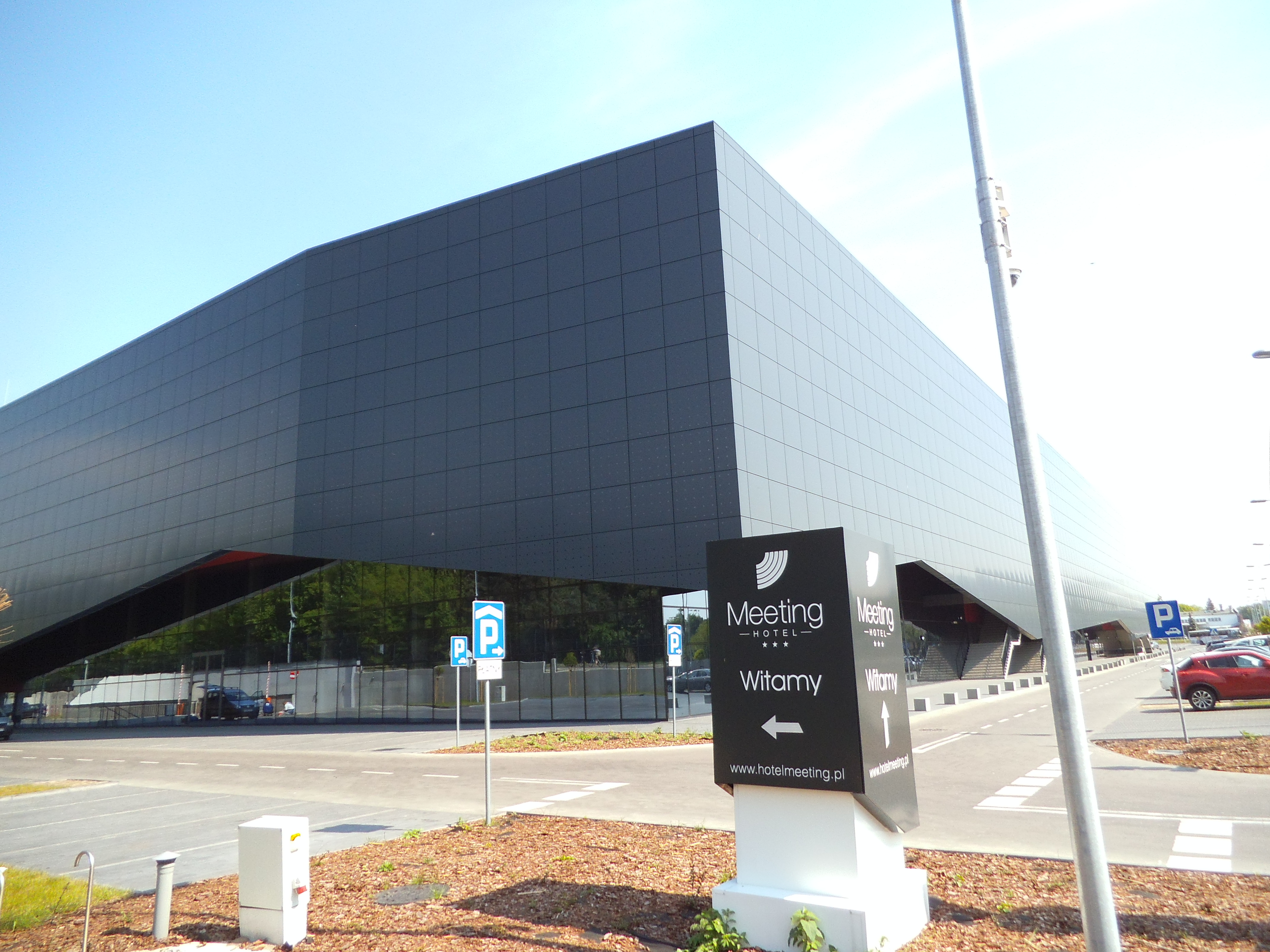 Hala widowiskowo-sportowa w Toruniu